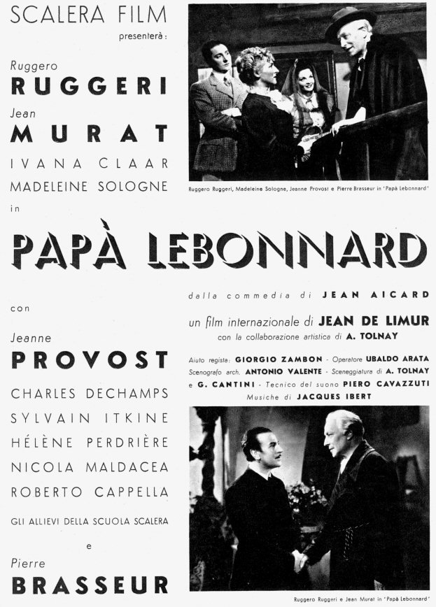 Flano cinematografico del film Papà Lebonnard (1939), regia di Jean de Limur. Fonte: Cinema, quindicinale di divulgazione cinematografica, anno IV, n. 61, 10 gennaio 1939, pag. 6.